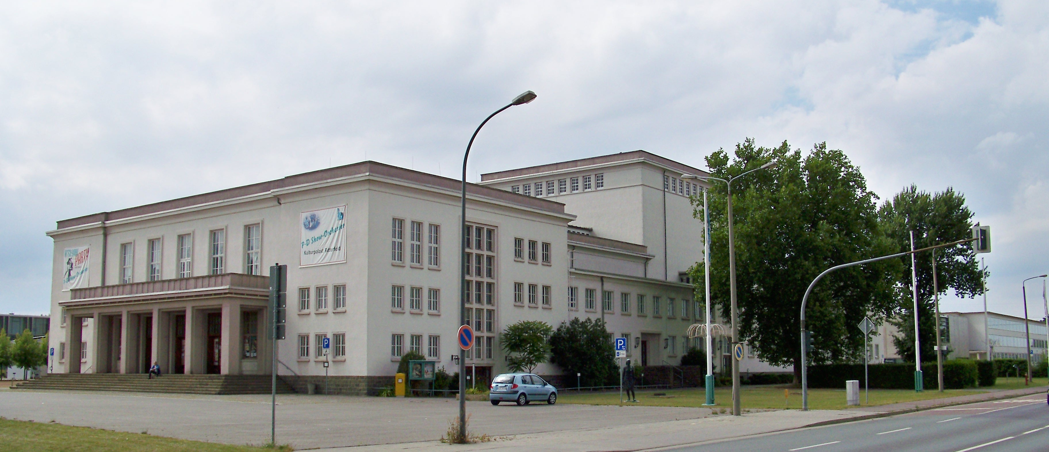 Kulturpalast Bitterfeld in der Parsevalstraße im Chemiepark Bitterfeld-Wolfen